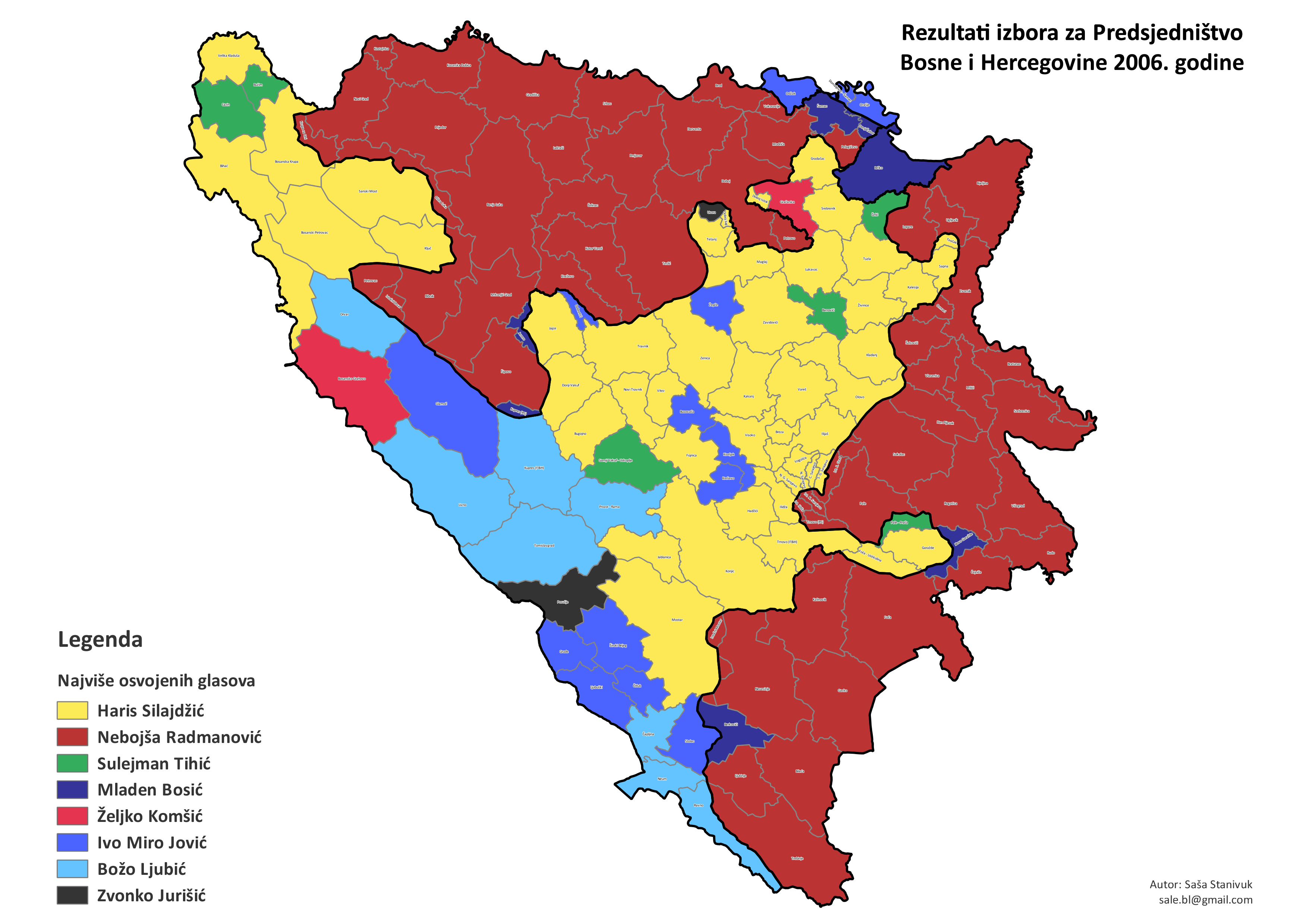 Srpskohrvatski / српскохрватски: Izbori za Predsjedništvo BiH 2006. godine